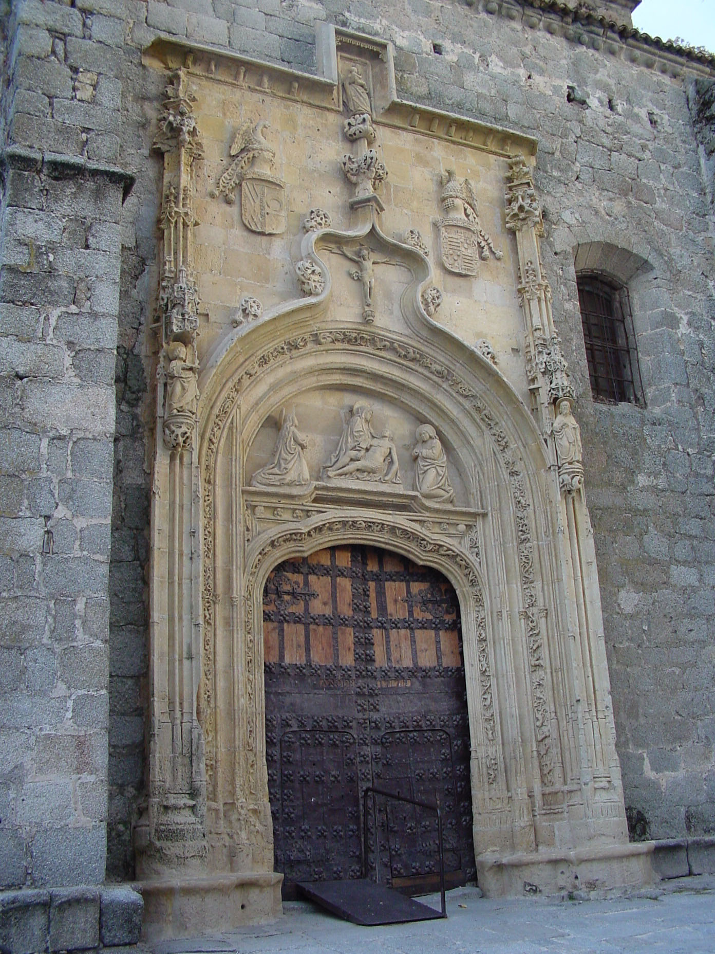 Puerta de iglesia en Colmenar Viejo.